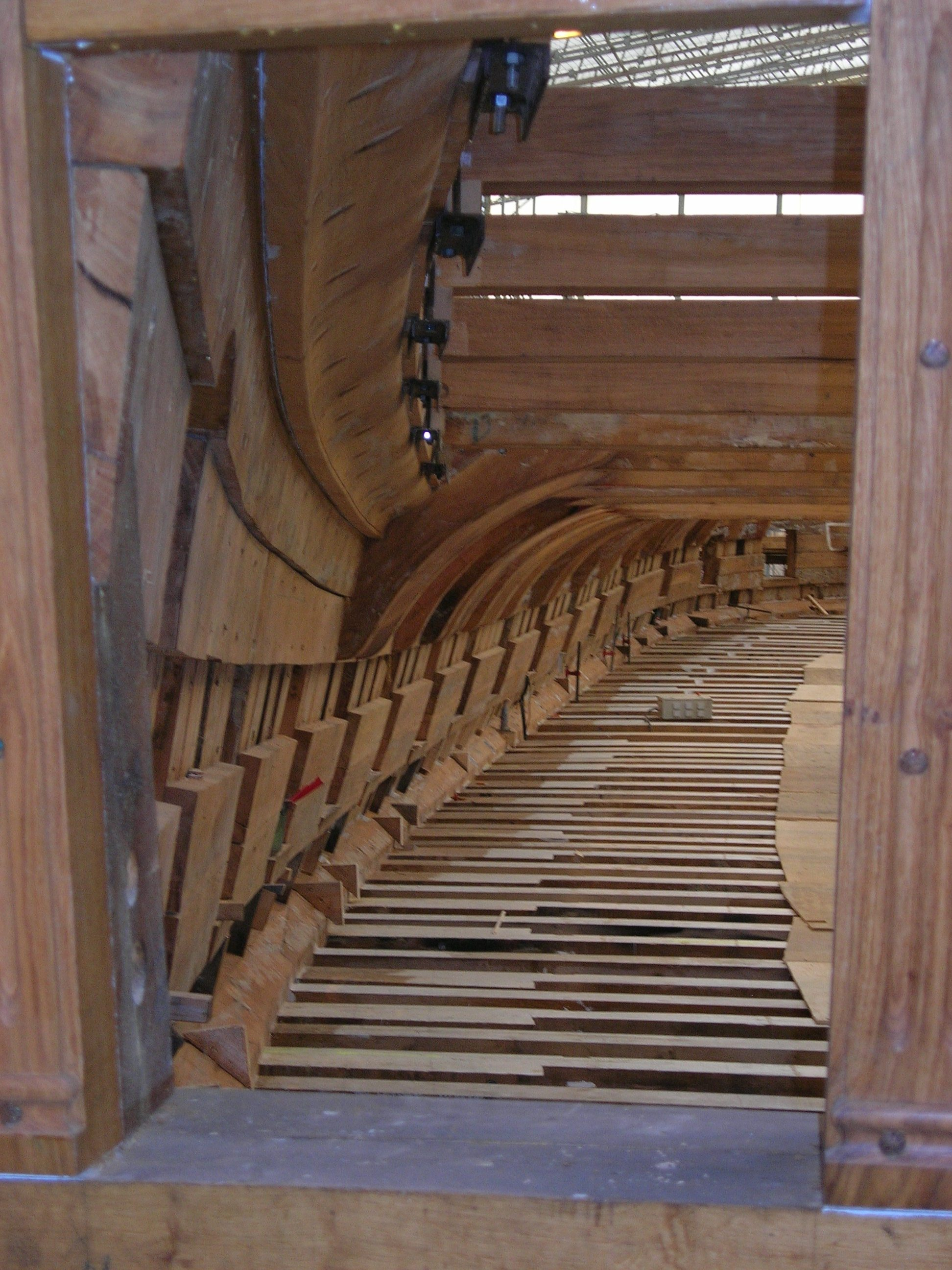 Reconstruction de l'Hermione à Rochefort (France)